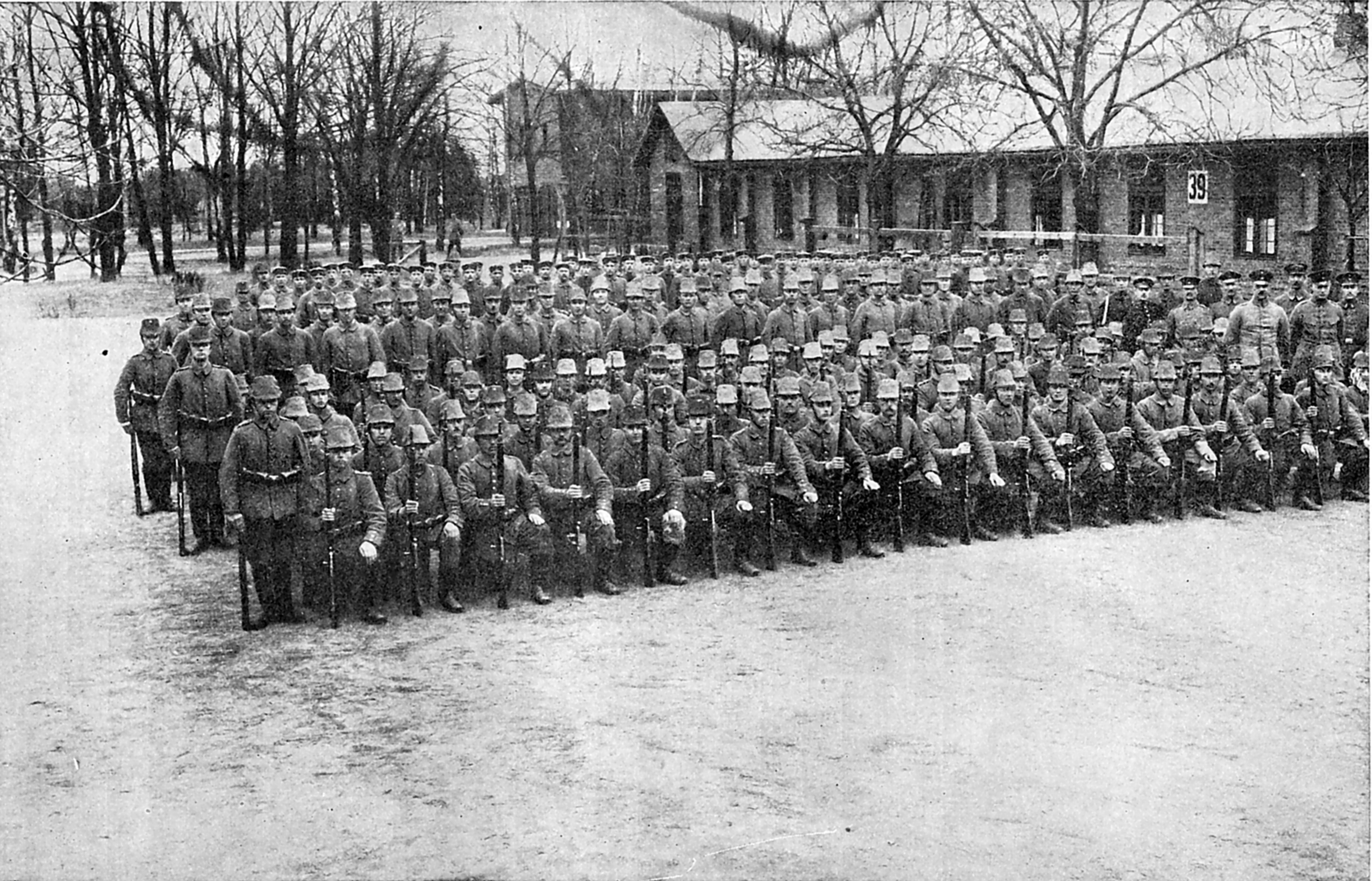 Description